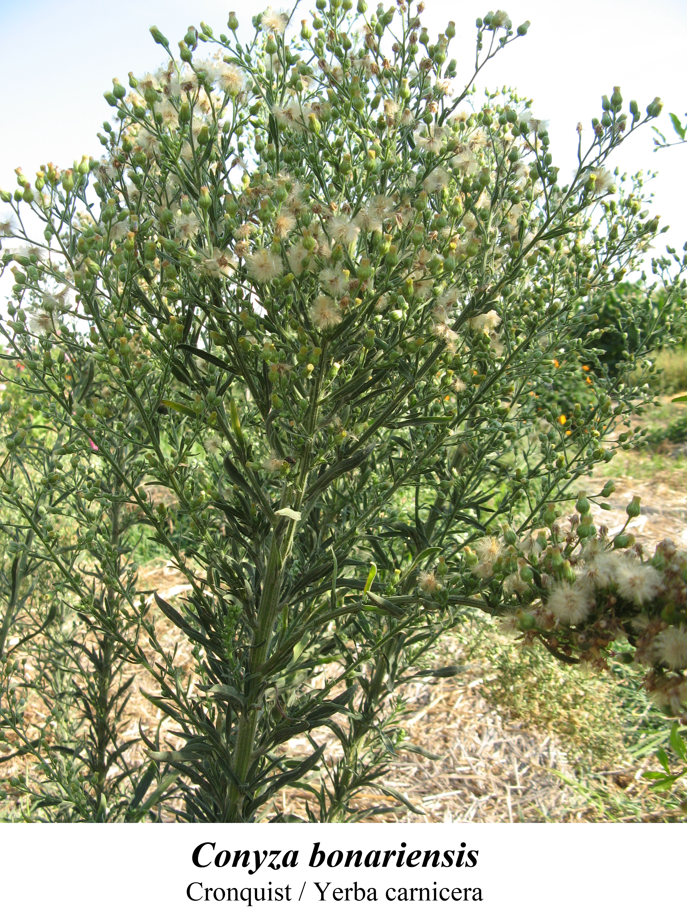 planta medicinal